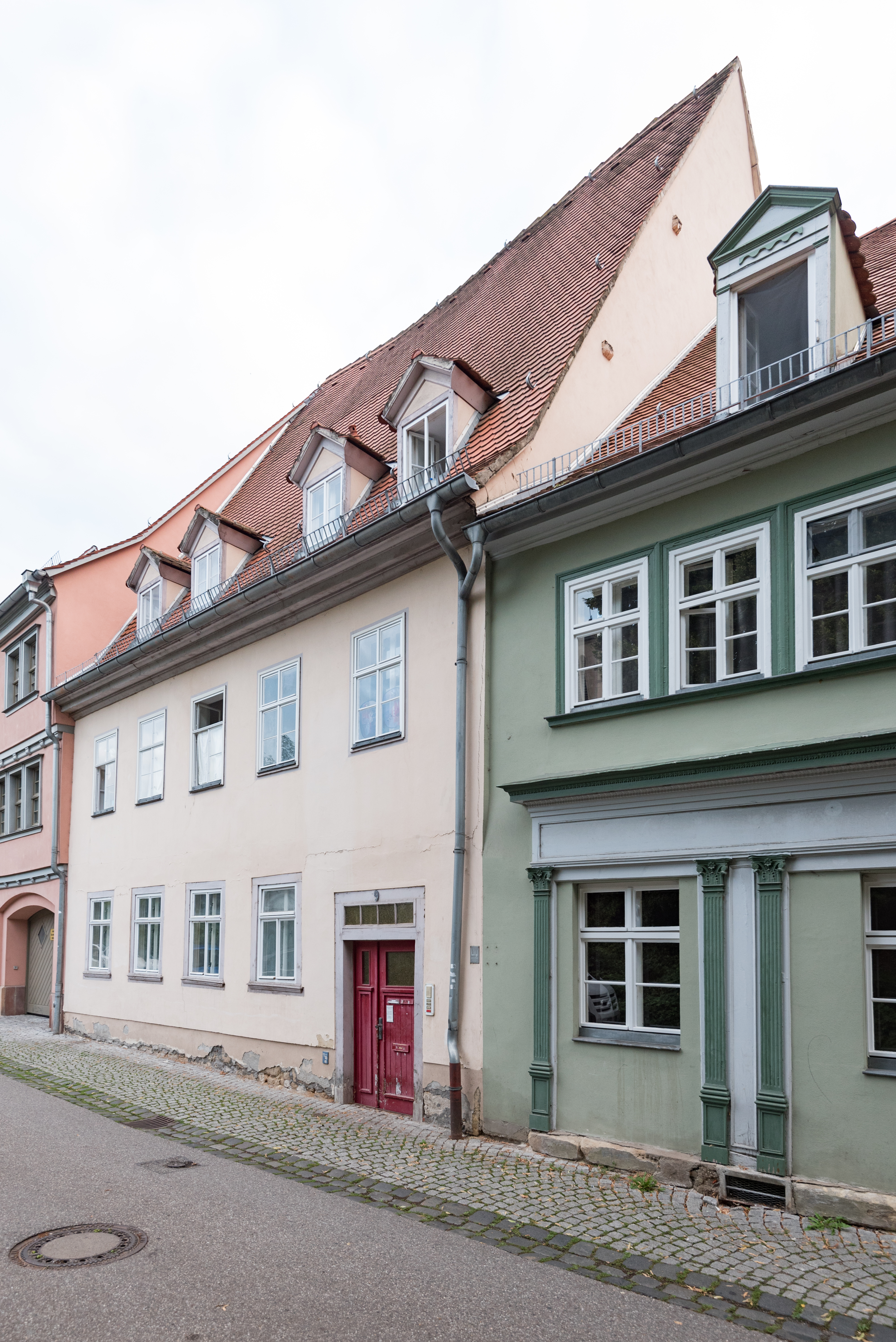 Naumburg (Saale), Kramerplatz 9